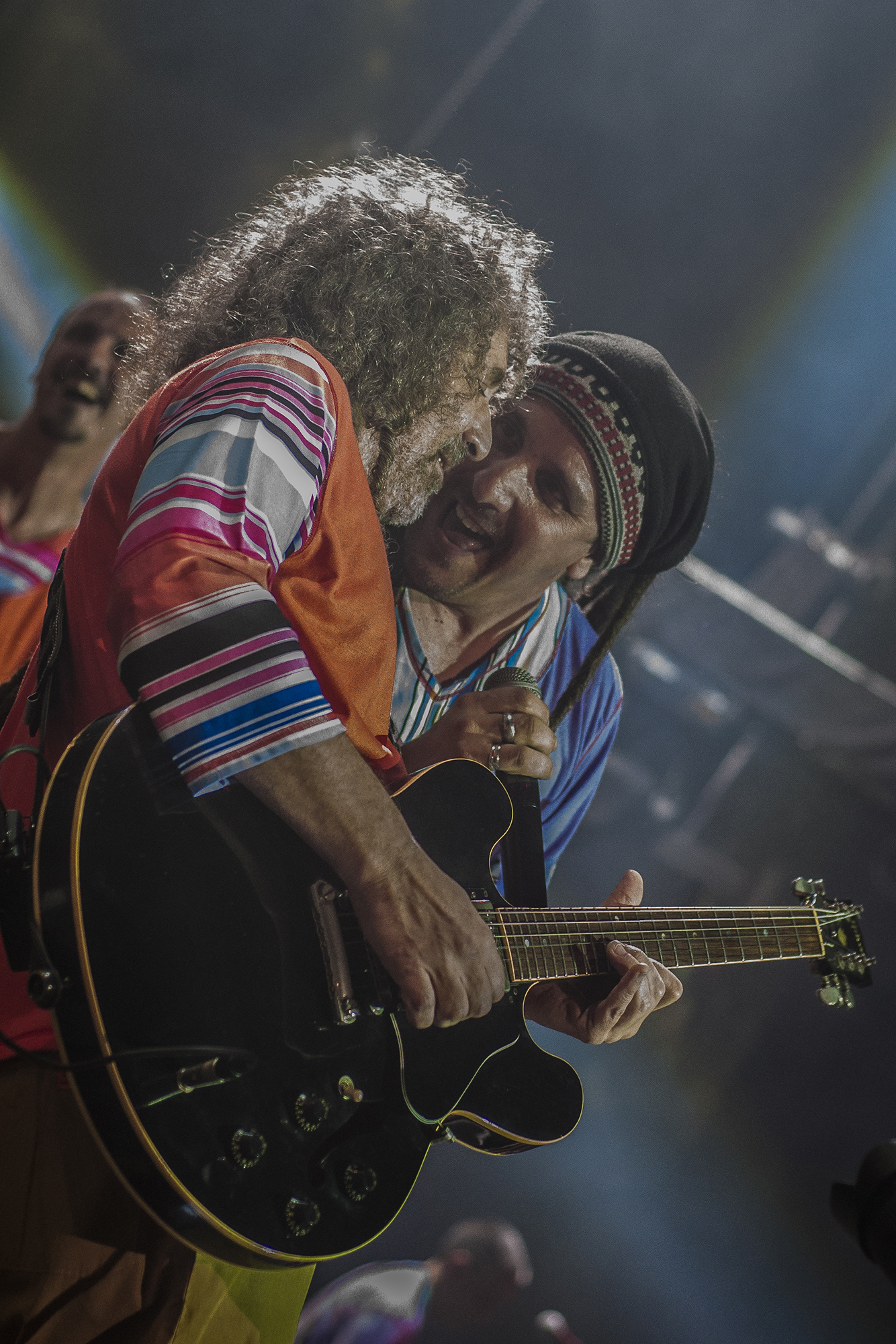 Oscar Humberto Righi, guitarrista y vocalista de Bersuit Vergarabat.